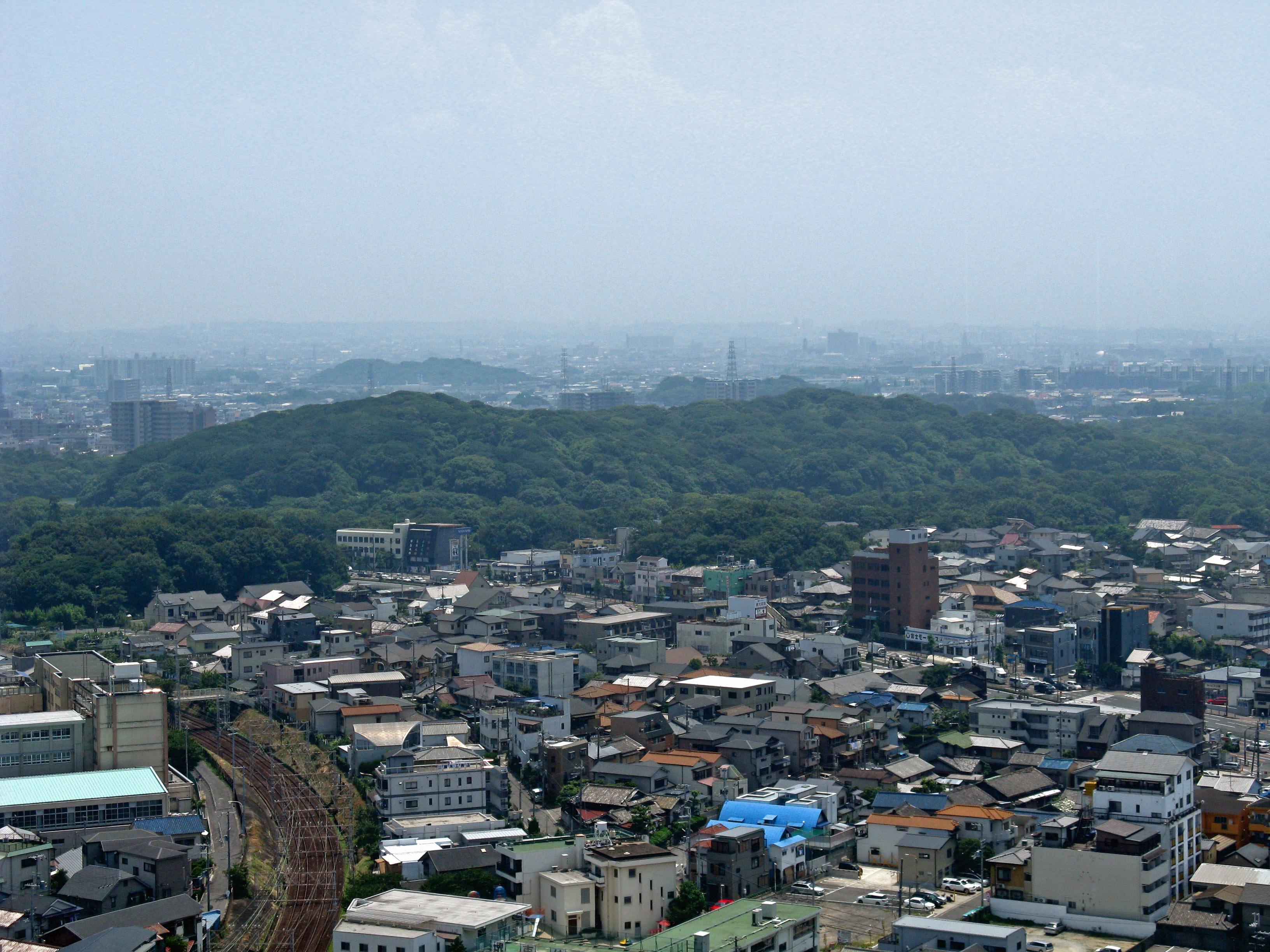 大仙陵古墳（仁徳天皇陵）堺市役所より撮影